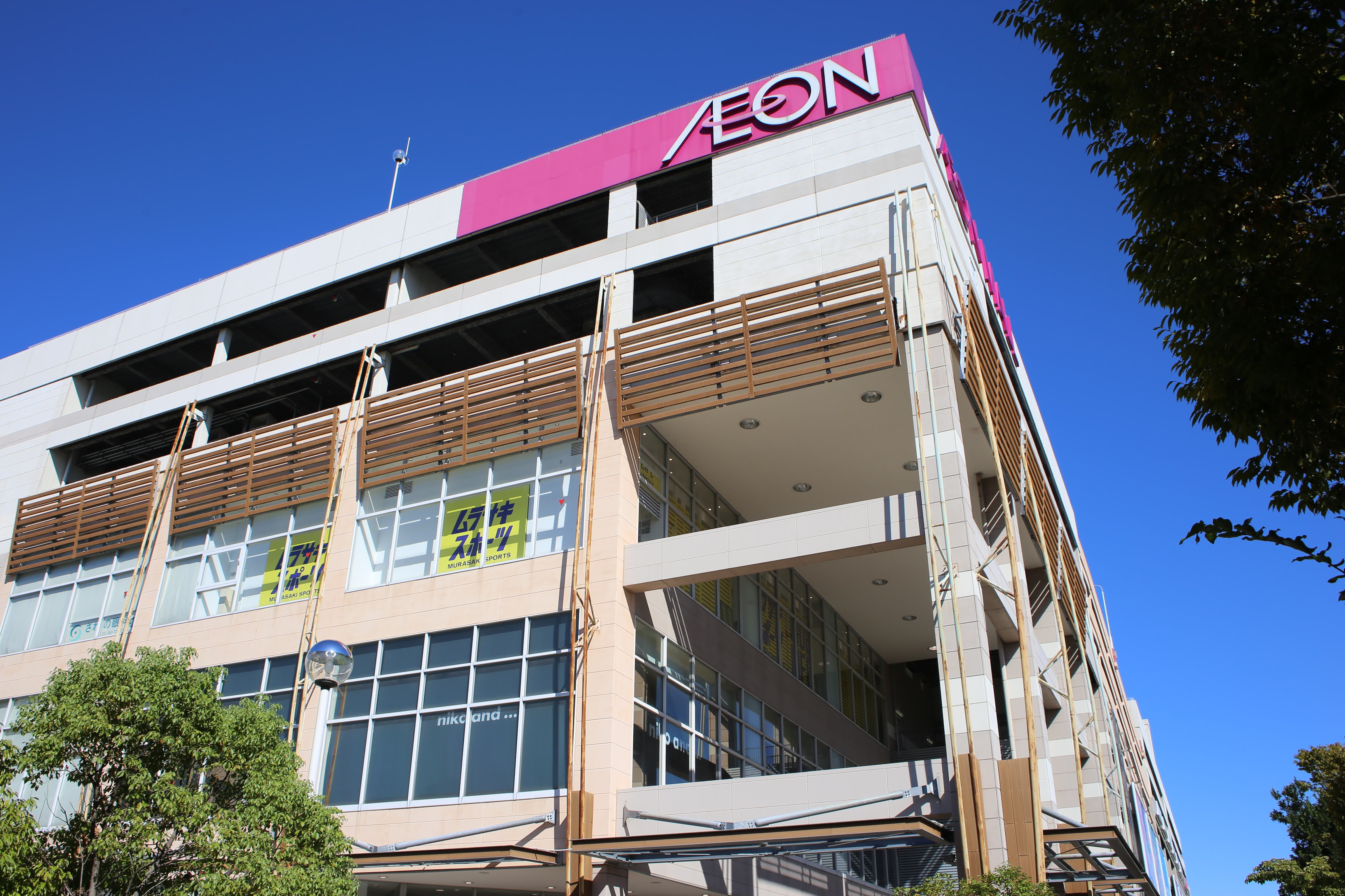 名古屋市東区矢田南四丁目 イオンナゴヤドーム前